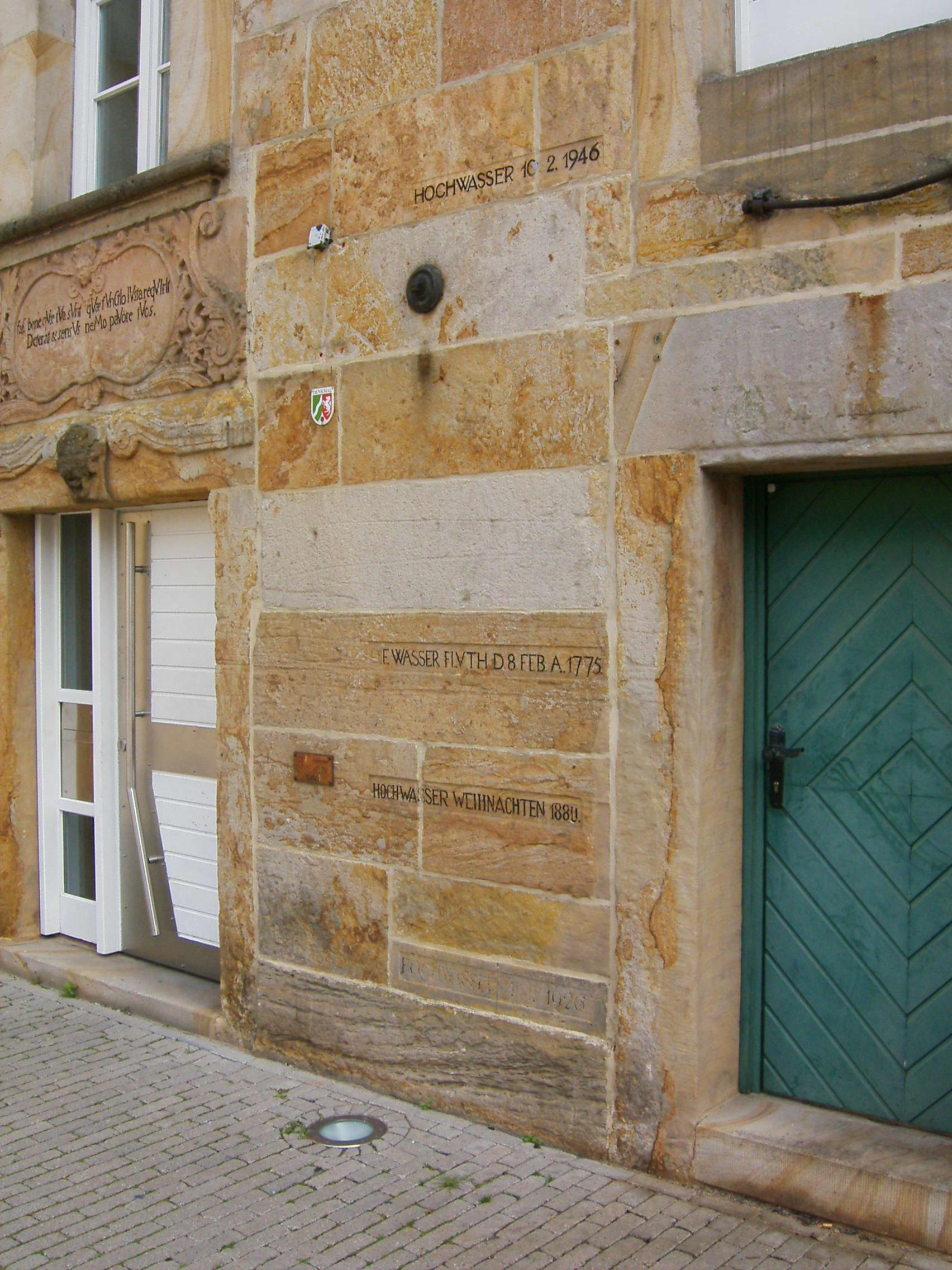 An der Emsmühle in Rheine sind Hochwasserstände der Ems verzeichnet. Die Emsmühle wurde 1754 an der linken Emsseite mit Bevergerner Sandstein erbaut. Am Gebäude sind Hochwasserstände markiert, auch der bisher höchste gemessene Wasserstand vom 10. Februar 1946.